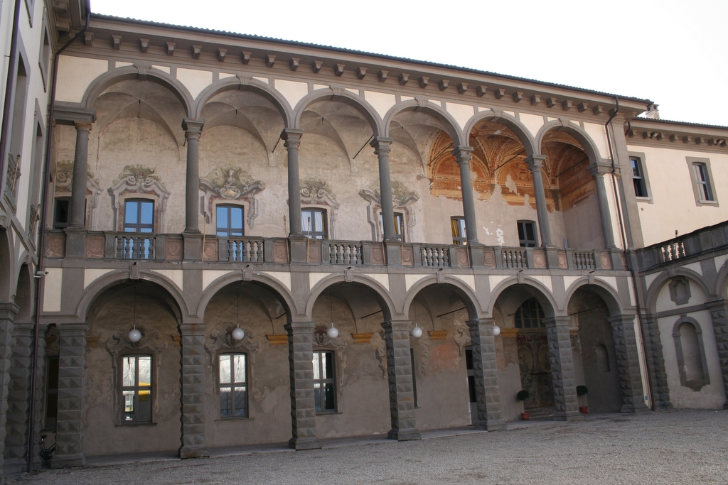 Autore Giorces.Brignano Gera d'Adda, Palazzo Vecchio, Visconti, cortile.